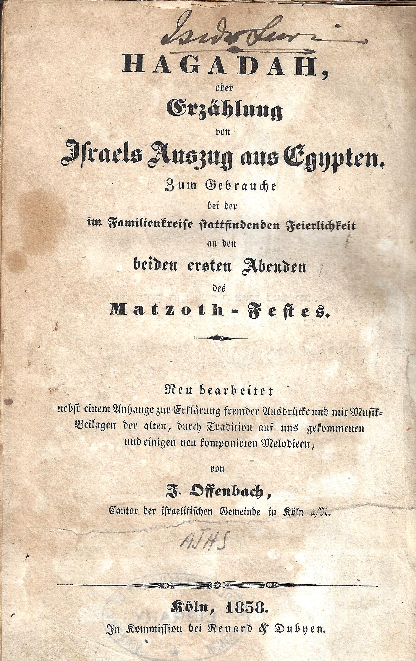 Deckblatt einer Komposition von Isaac Offenbach: Hagadah oder Erzählung von Israels Auszug aus Egypten: Zum Gebrauch bei der im Familienkreise stattfindenden Feierlichkeit an den beiden ersten Abenden ds Mathoth-Festes. Neu bearbeitet nebst einem Anhange zur Erklärung fremder Ausdrücke und mit Musik-Beilagen der alten, durch Tradition auf uns gekommenen und einigen neu komponirten Melodien, von J. Offenbach, Kantor der israelitischen Gemeinde Köln a./Rh. Köln 1838, in Kommission bei Renard & Dubyen